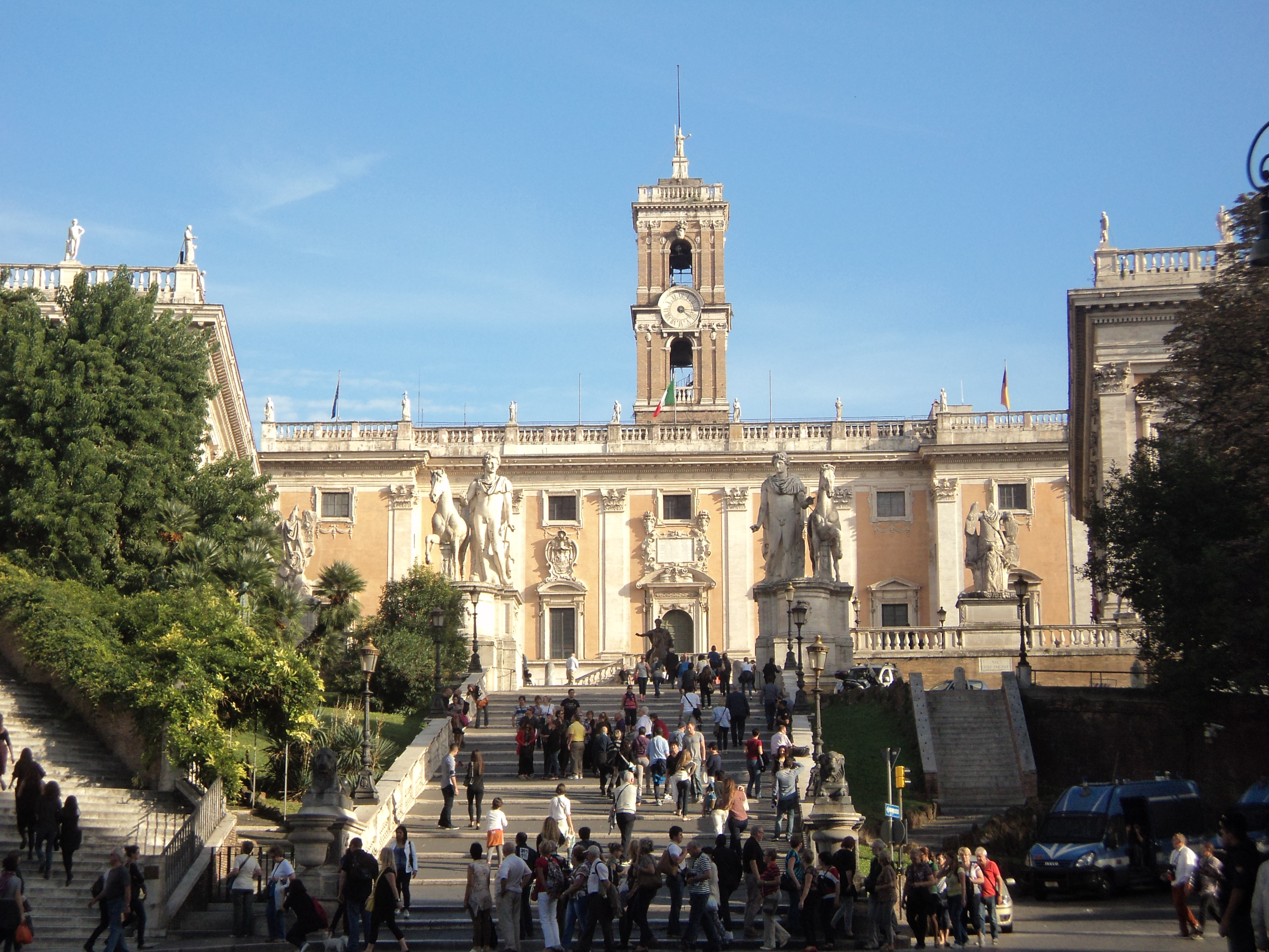 Campidoglio